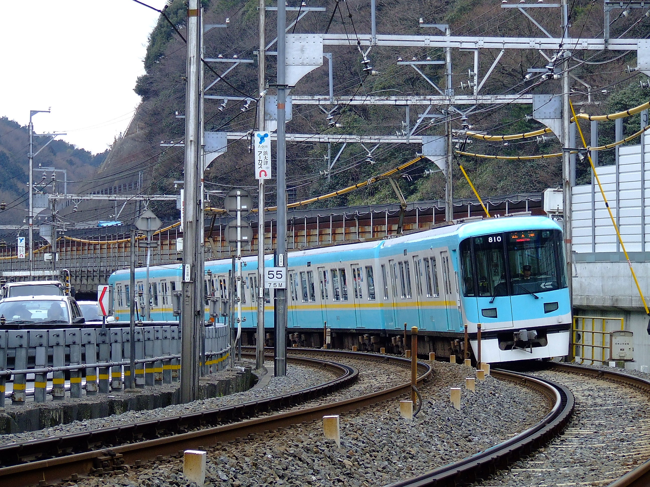 京阪京津線800系電車 国道1号線と並走する急勾配区間の大谷駅付近にて